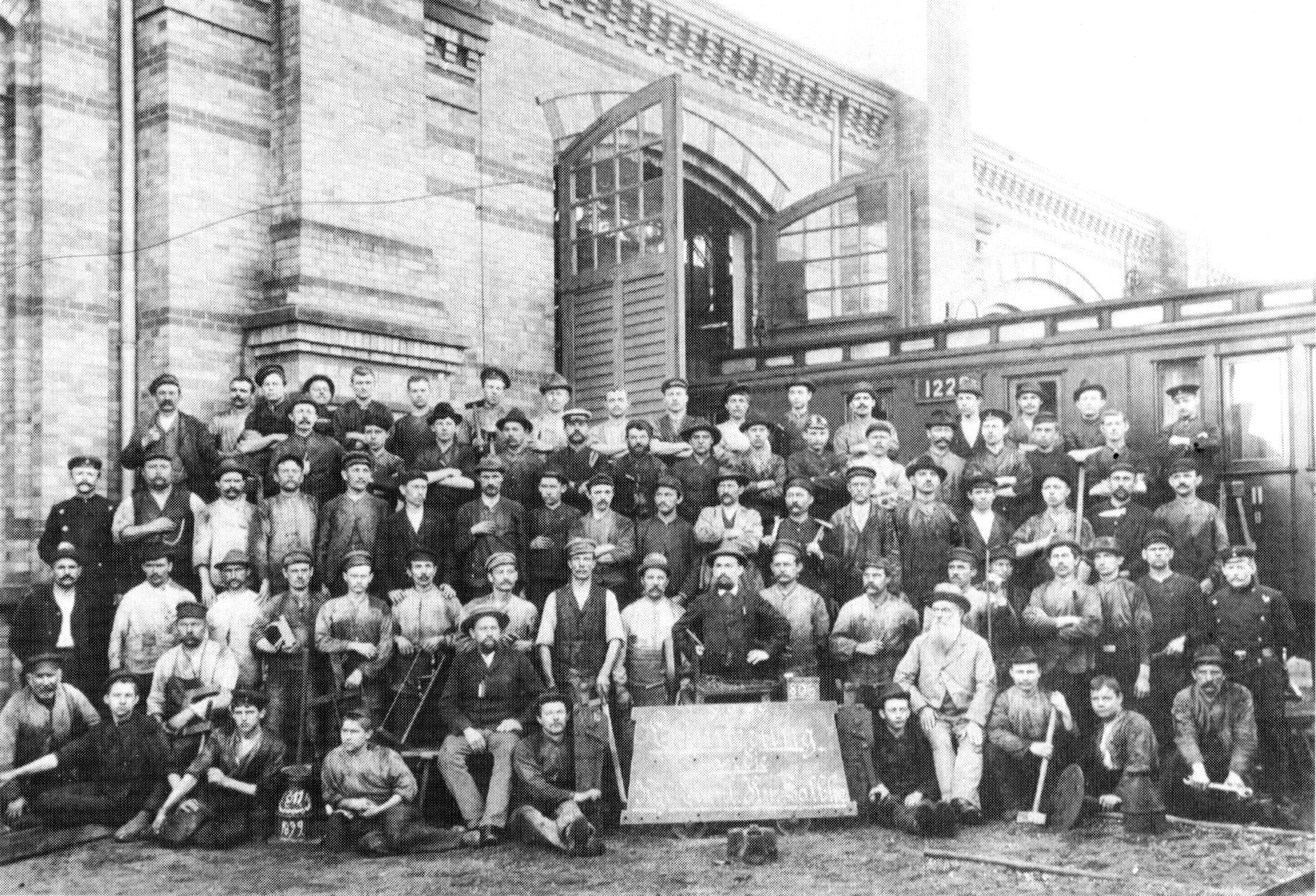 Belegschaft des RAW Salbke im Jahr 1899